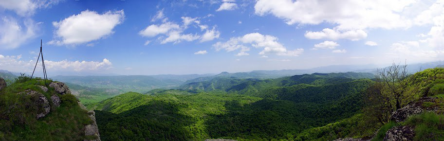 Вид на Качахакаберд